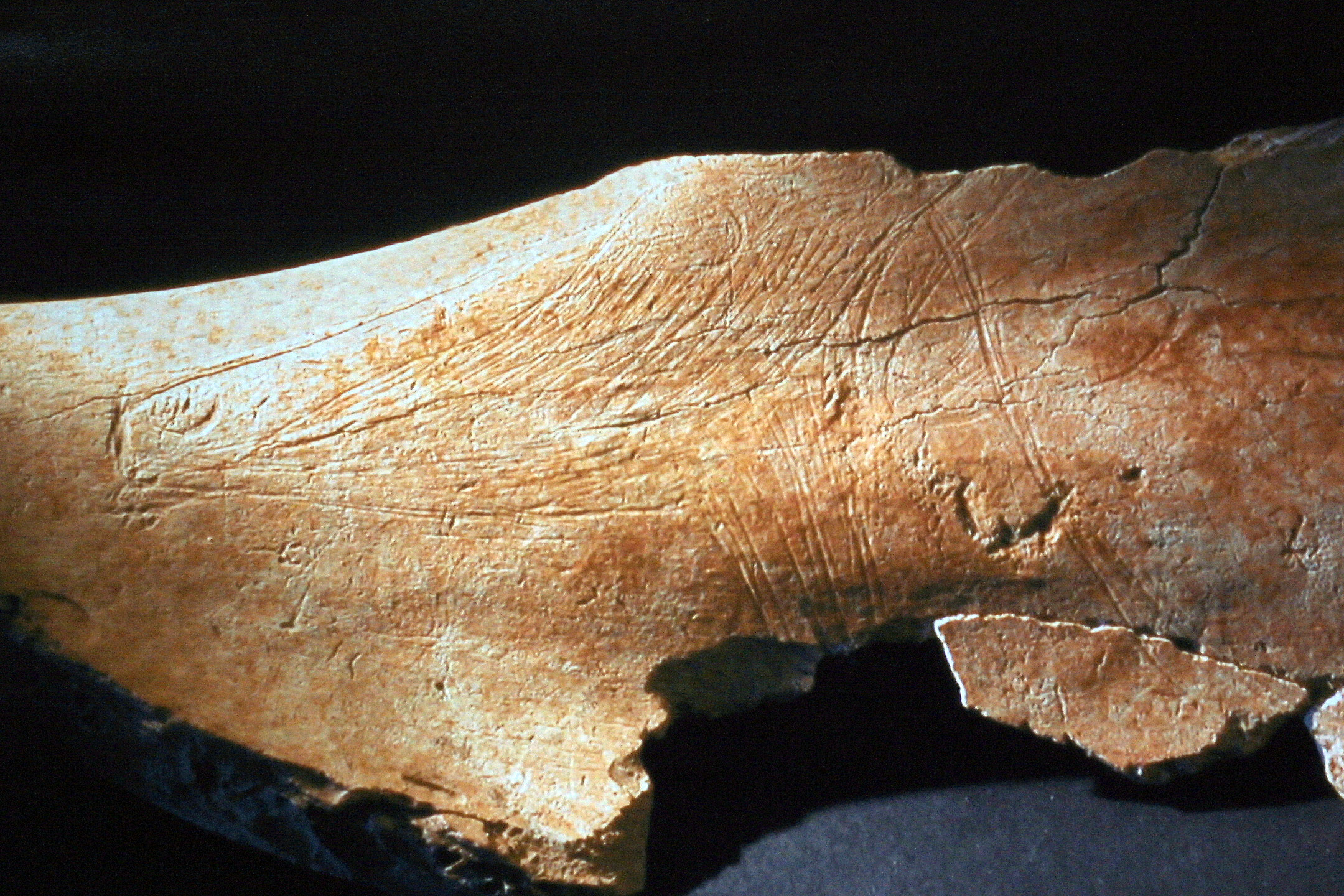 El consejero de Cultura, Turismo y Deporte, Francisco Javier López Marcano, y el director de la excavación de la Cueva del Mirón (Ramales de la Victoria), profesor Manuel González Morales, han presentado esta mañana una importante pieza hallada en dicho yacimiento y que data de la época Magdaleniense Inferior, hace unos 17.000 años. Se trata de un omoplato o escápula que contiene un grabado de la cabeza de una cierva perfectamente definido y en buen estado de conservación.